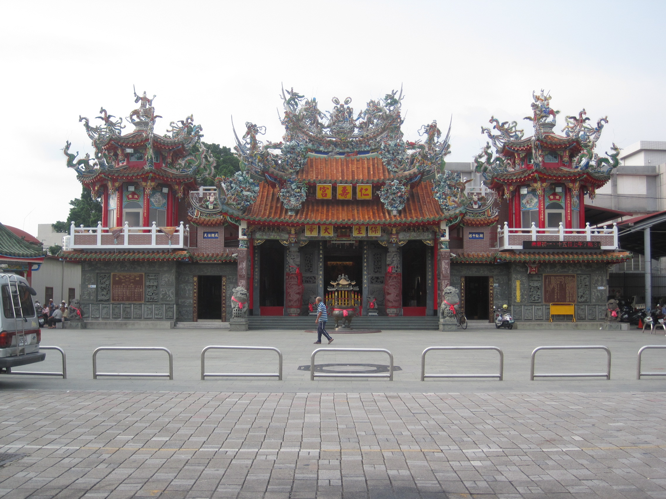 2016年的仁壽宮